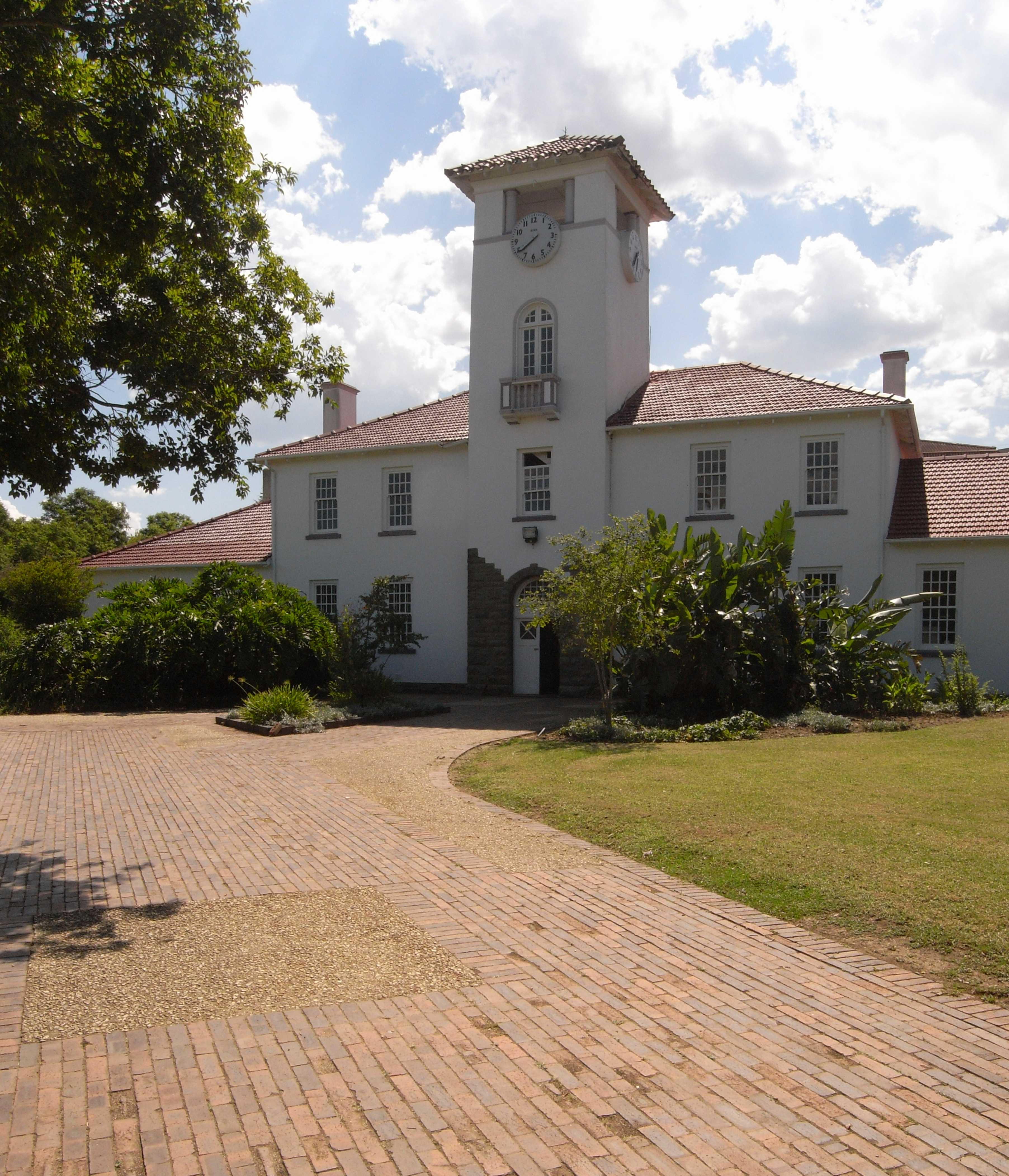 Universität Fort Hare, historisches Gebäude vom ehemaligen Fort